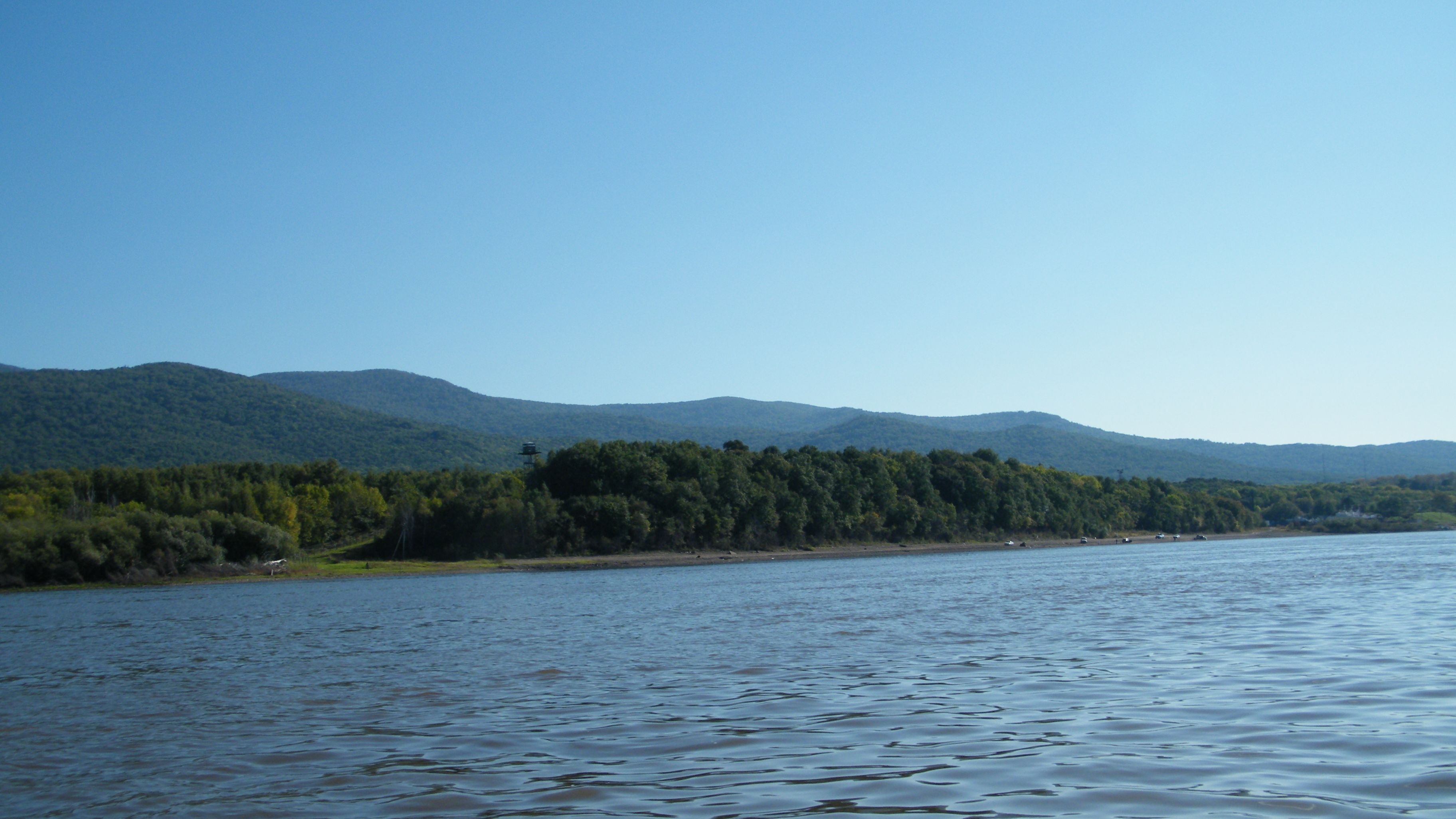 Амурская протока и село Казакевичево сент 2014